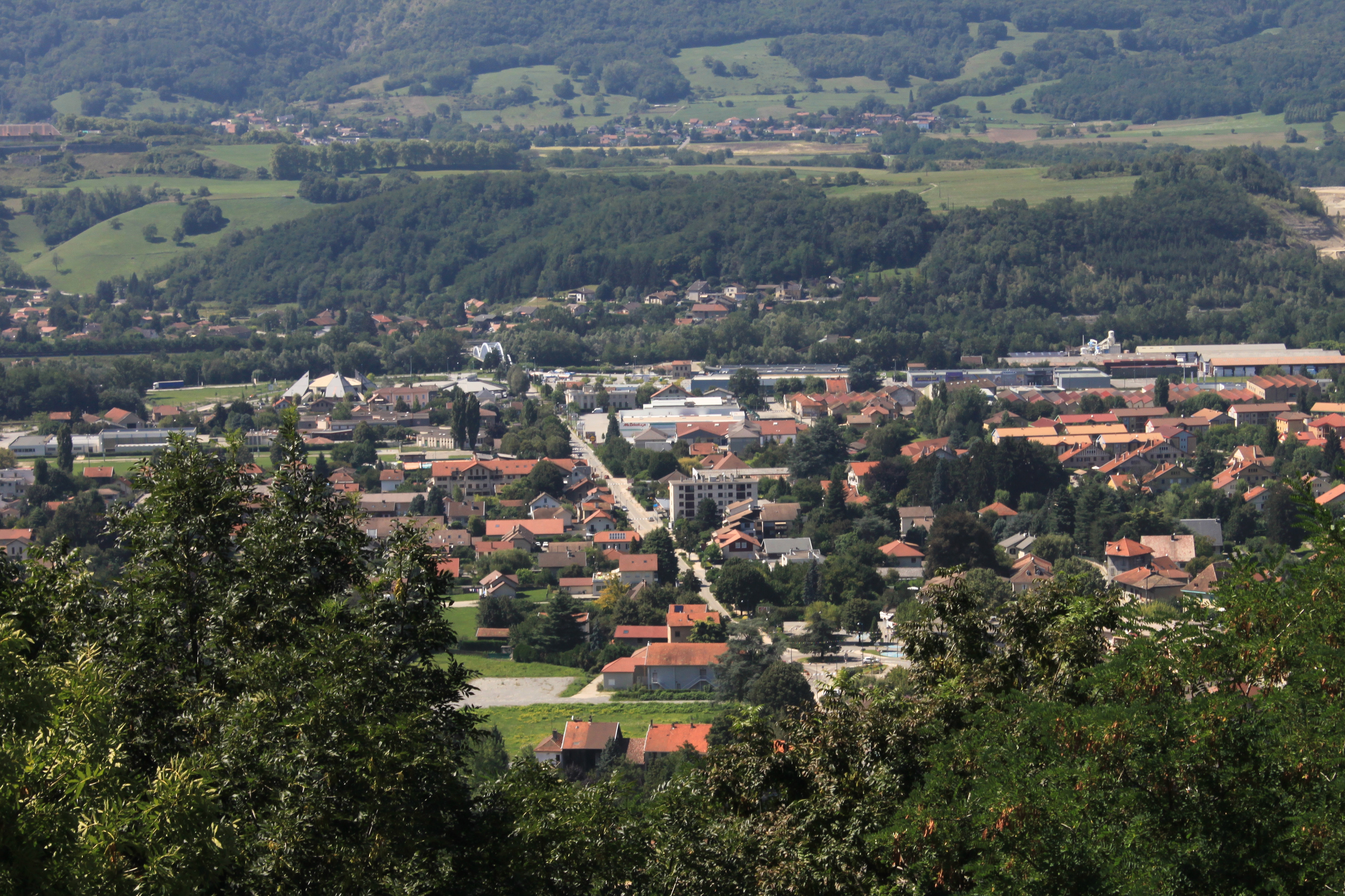 Pontcharra vu depuis la Tour d'Avalon